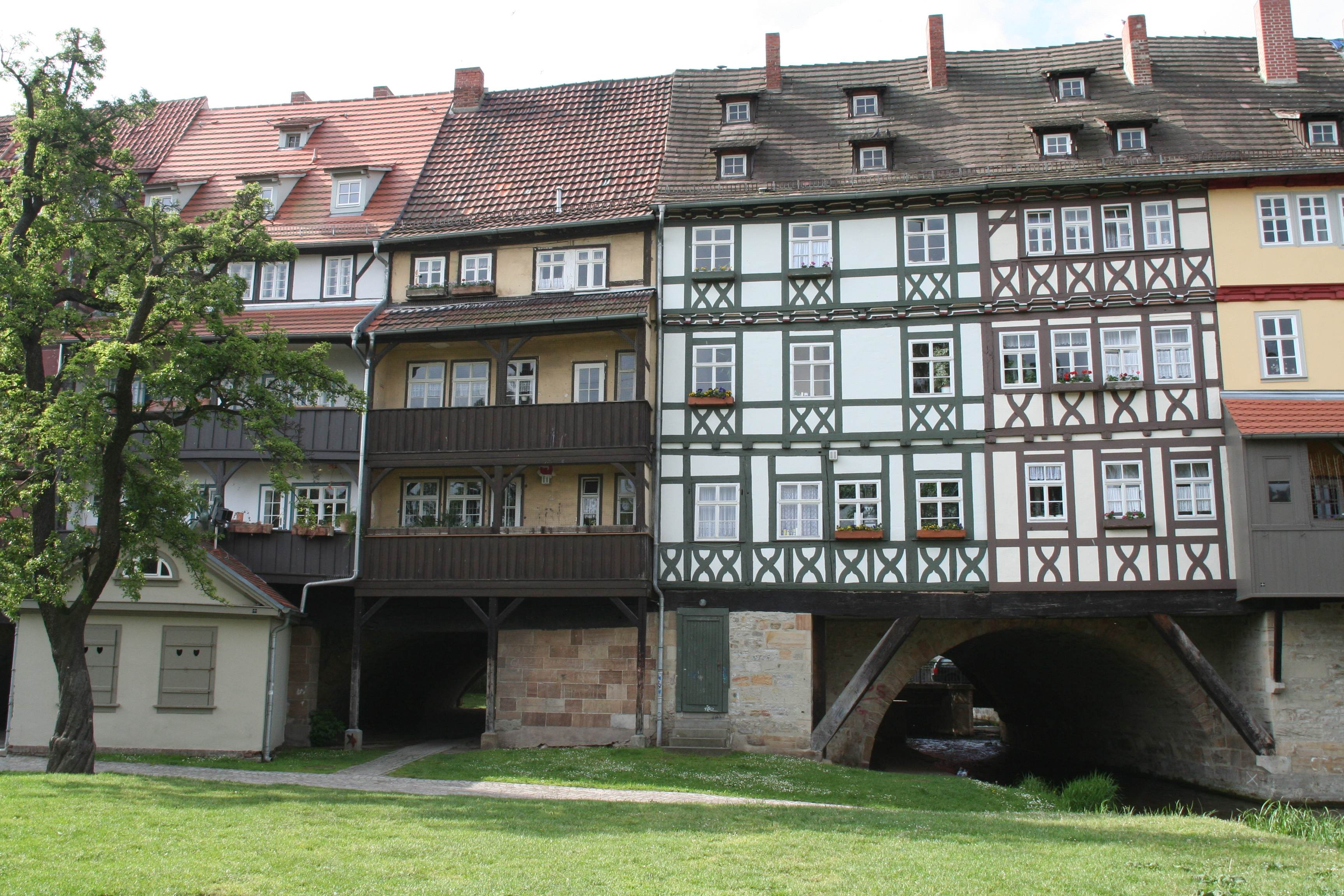 Krämerbrücke in Erfurt